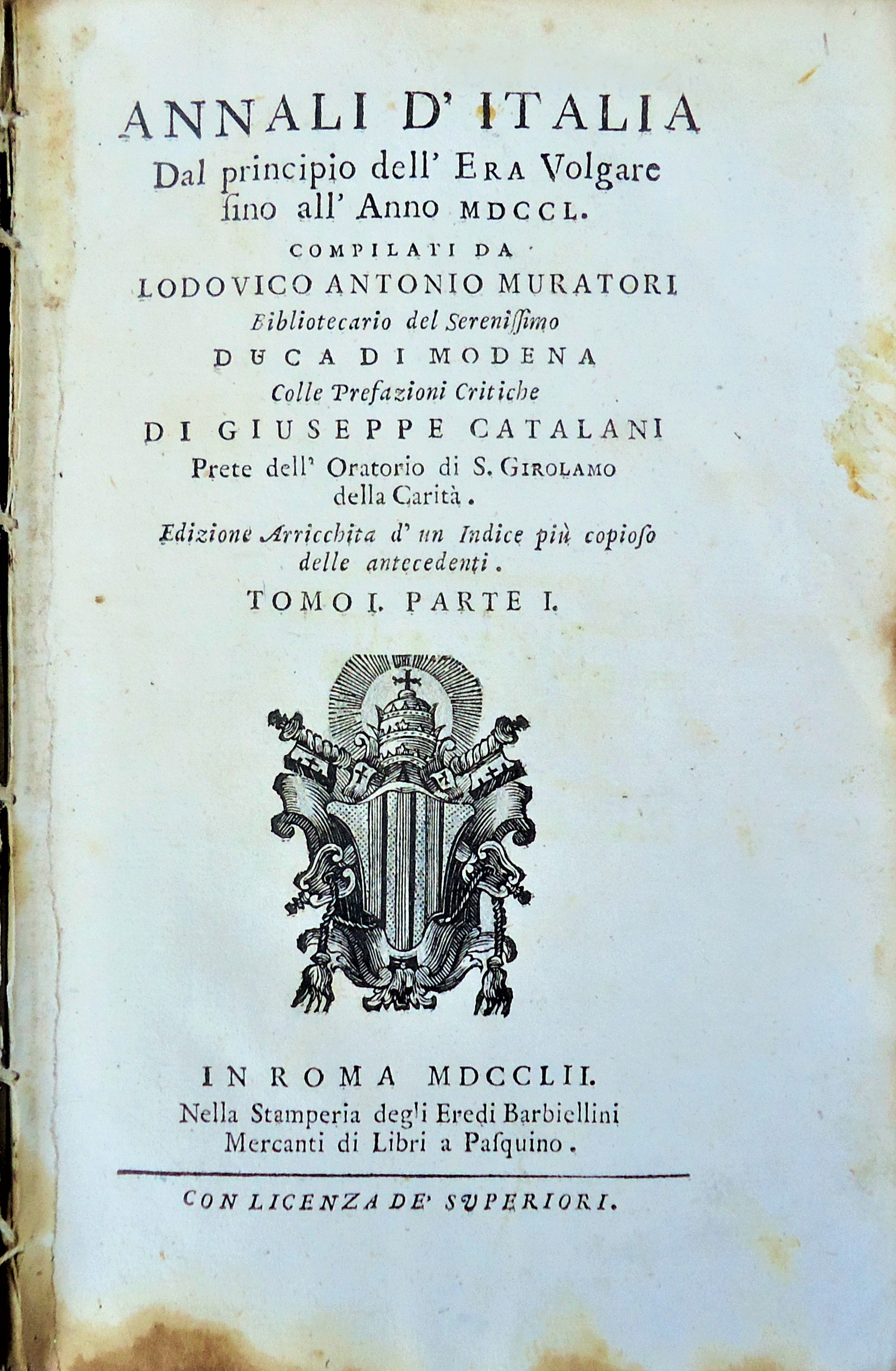 Annali d'Italia, dal principio dell'Era Volgare fino all'Anno MDCCL, compilati da Lodovico Antonio Muratori, tomo I, parte I. (coll. Fausta Samaritani-Muratori)